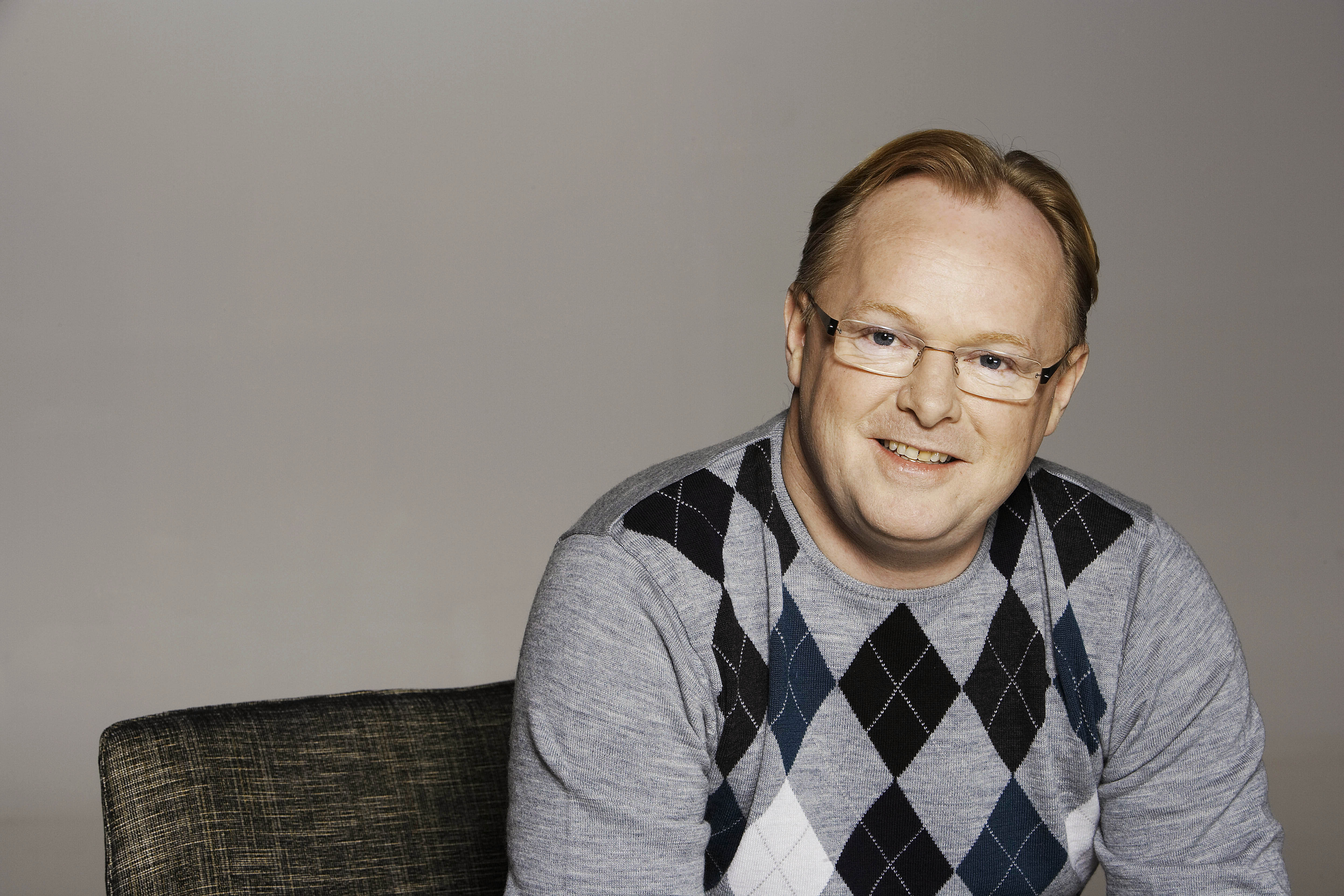 Per Sandberg, FrP-politiker